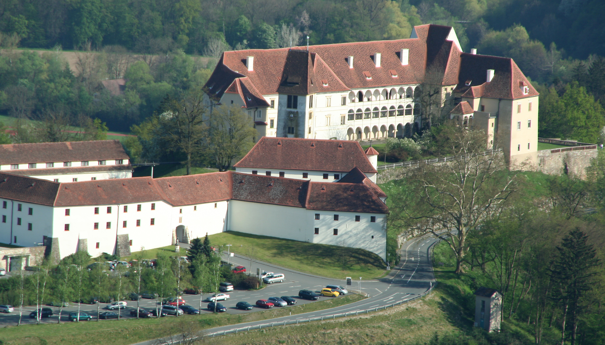 Hochschloss mit Landesgerichtstrakt